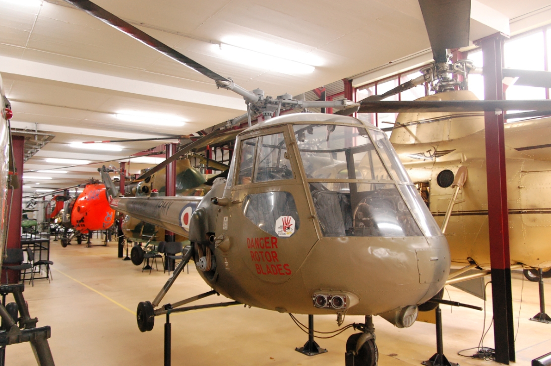 Hubschraubermuseum Bückeburg